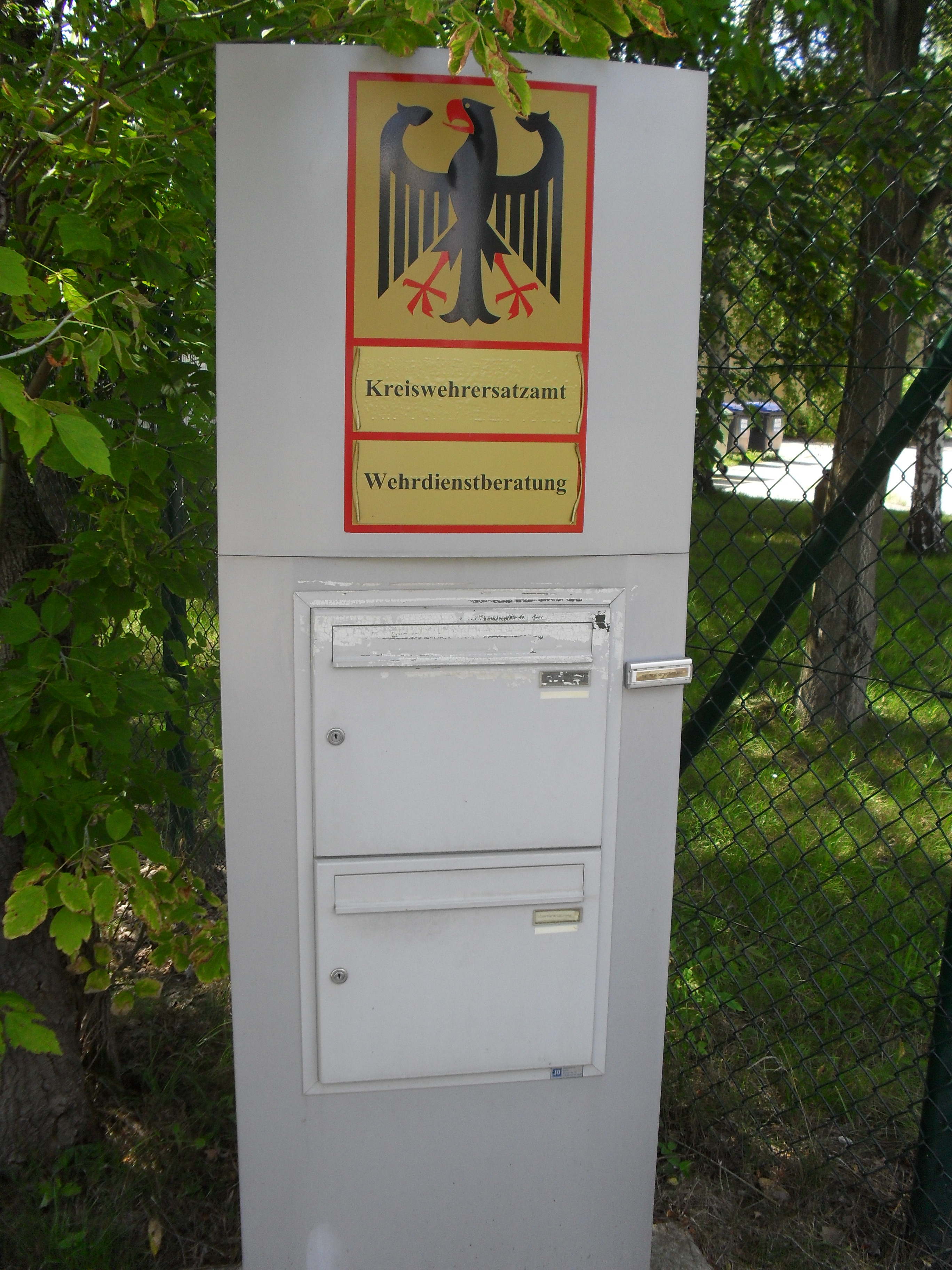 Klingelschild Kreiswehrersatzamt Leipzig